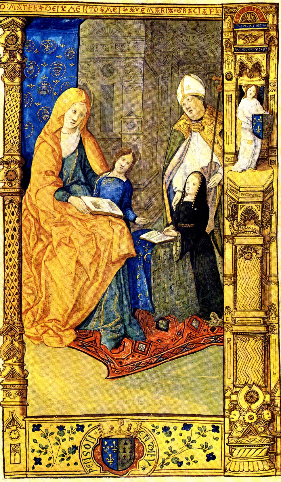 Miniatur Claude mit Schutzheiligen